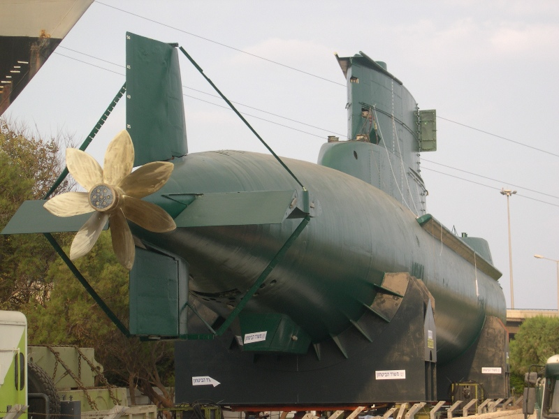 HN-INS Gal (wave), אח"י גל